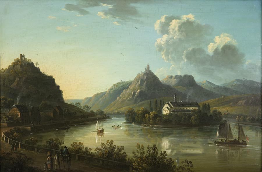 Rolandseck_und_Siebengebirge